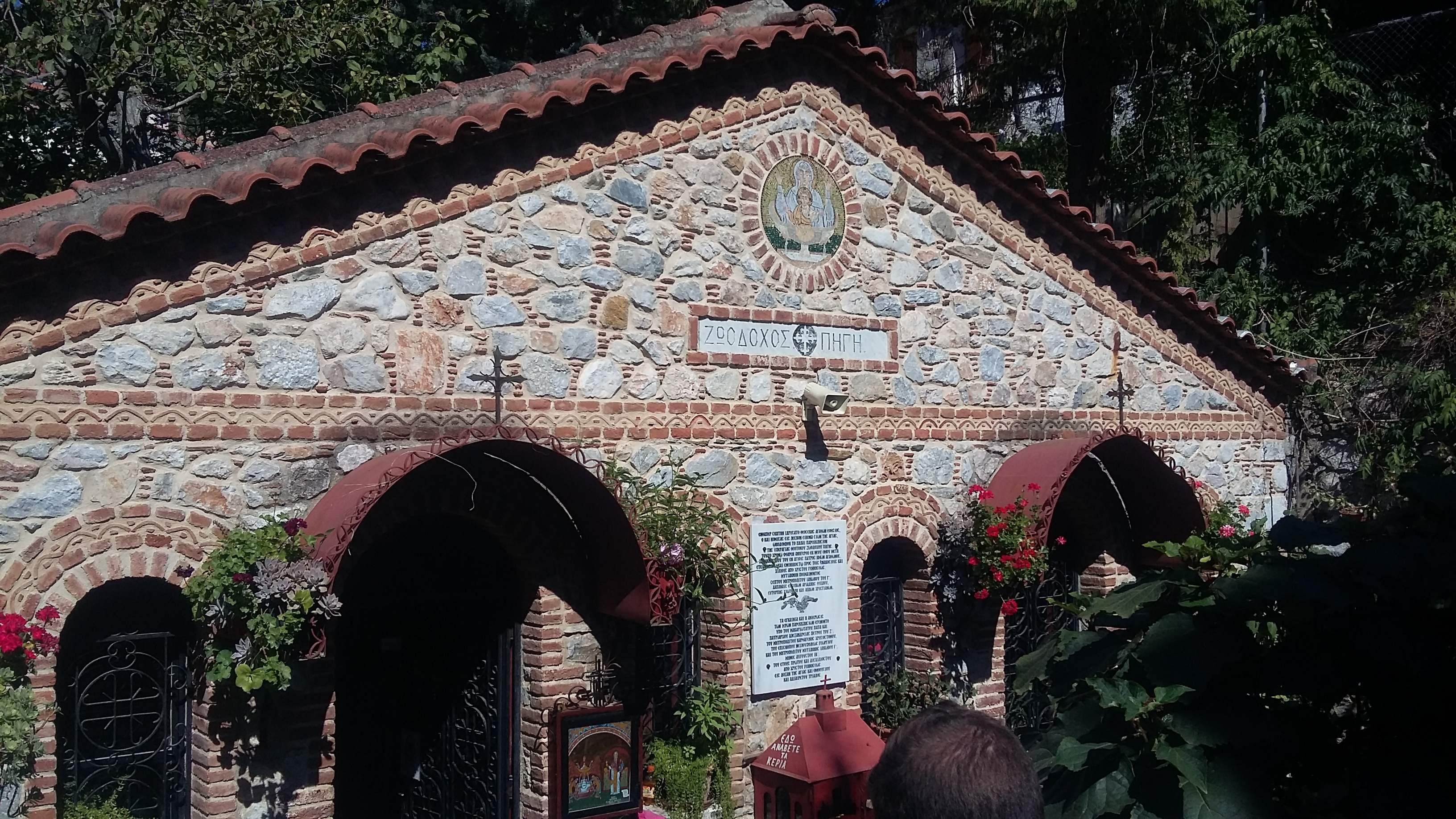 Το παρεκκλήσι της Ζωοδόχου Πηγής στην Αγιάσο